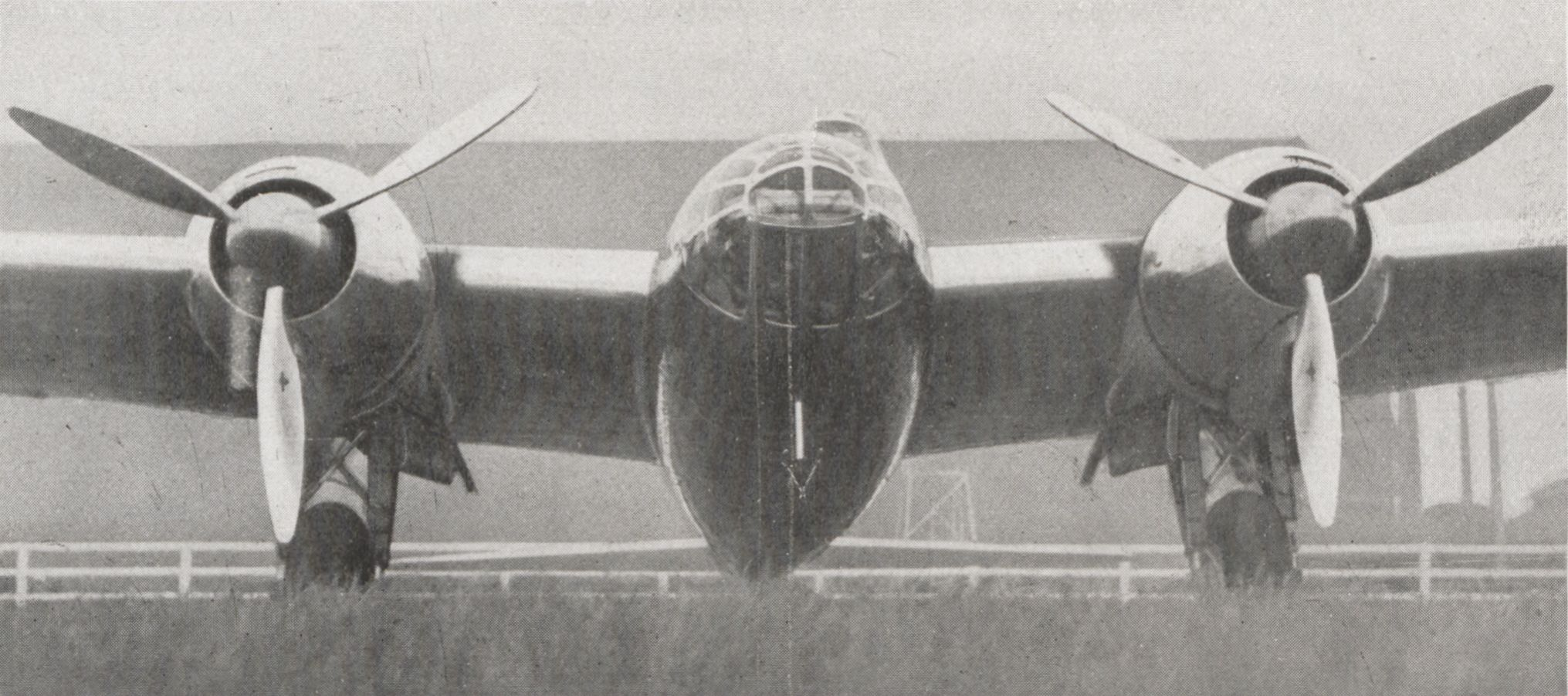 Un aspect partiel de face de l'AMIOT-S.E.C.M. 351 à moteurs GNOME-RHÔNE 14 N.